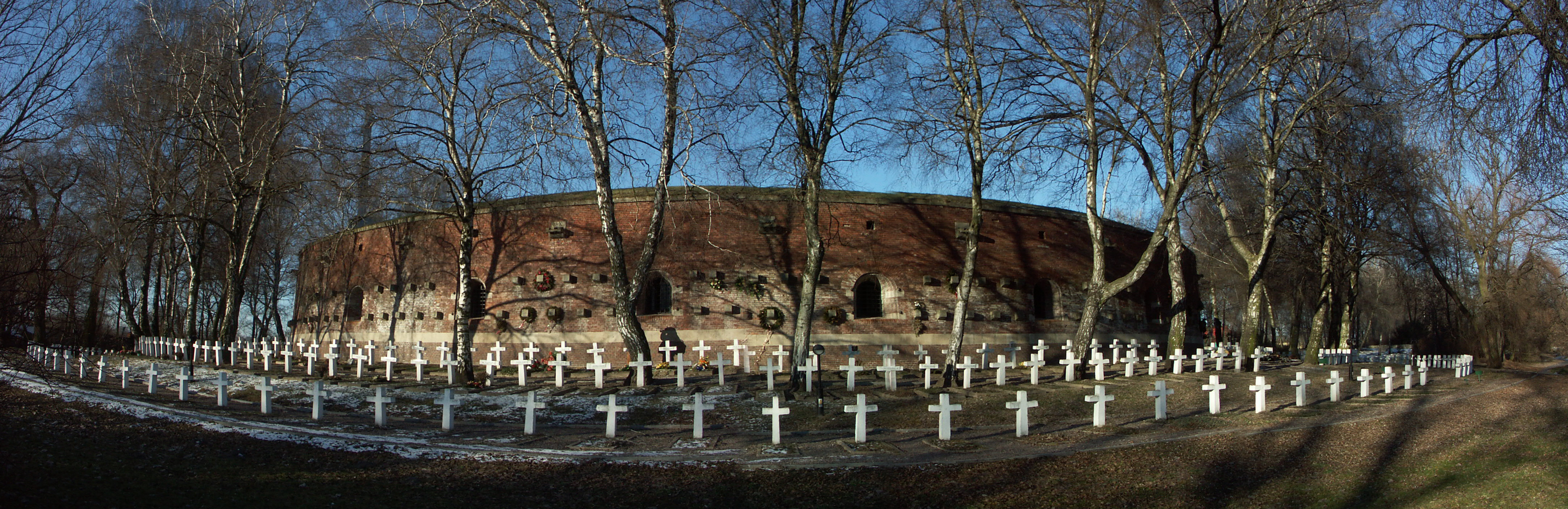 Panorama Zamojskiej Rotundy